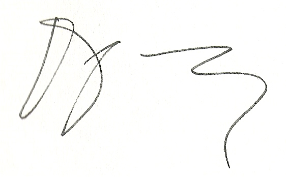 Signature autographe de l'écrivain Douglas Kennedy (détail d'une dédicace, collection personnelle Jean-Marie David)